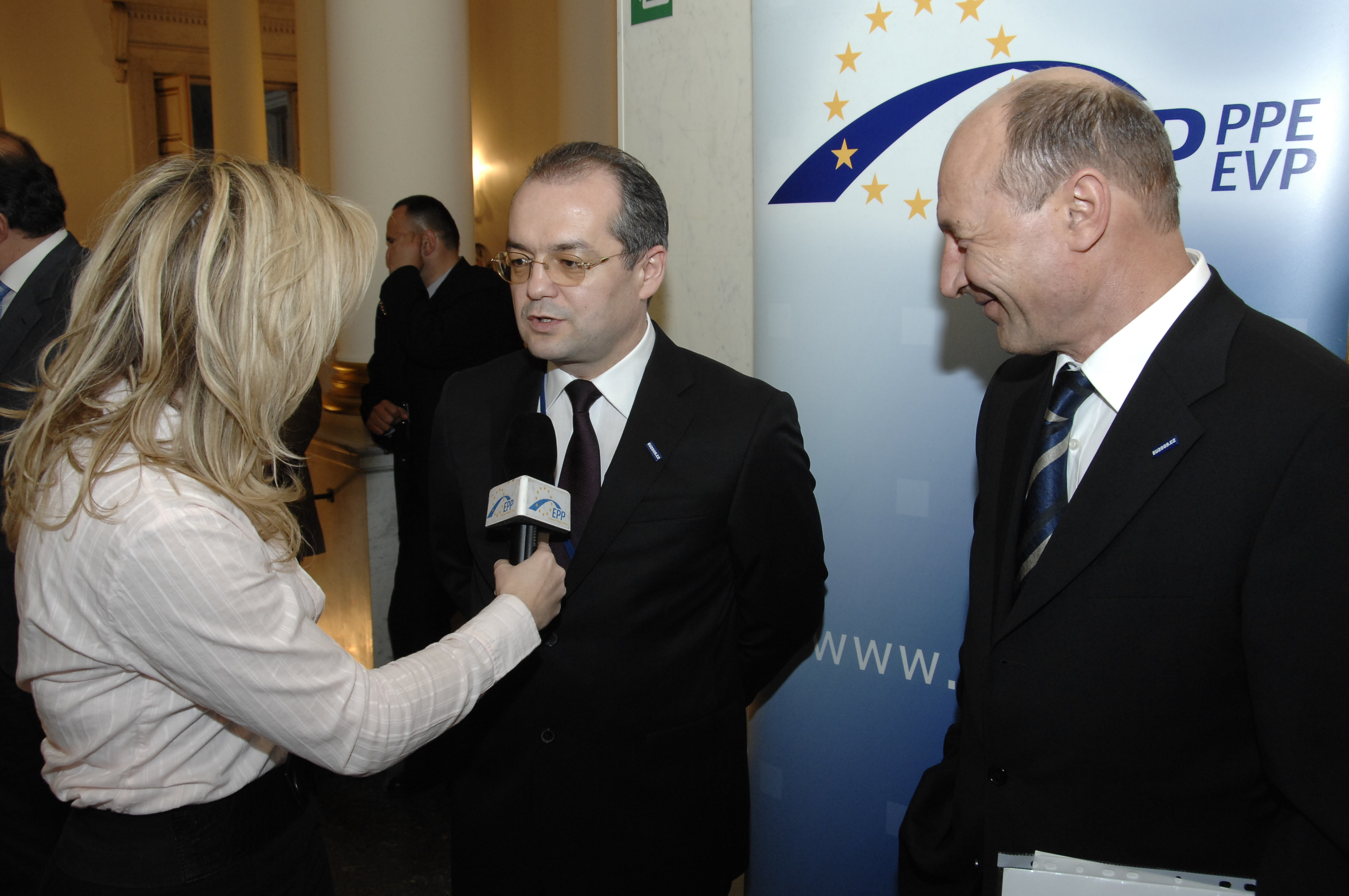 EPP Summit 19 March 2009 (321)